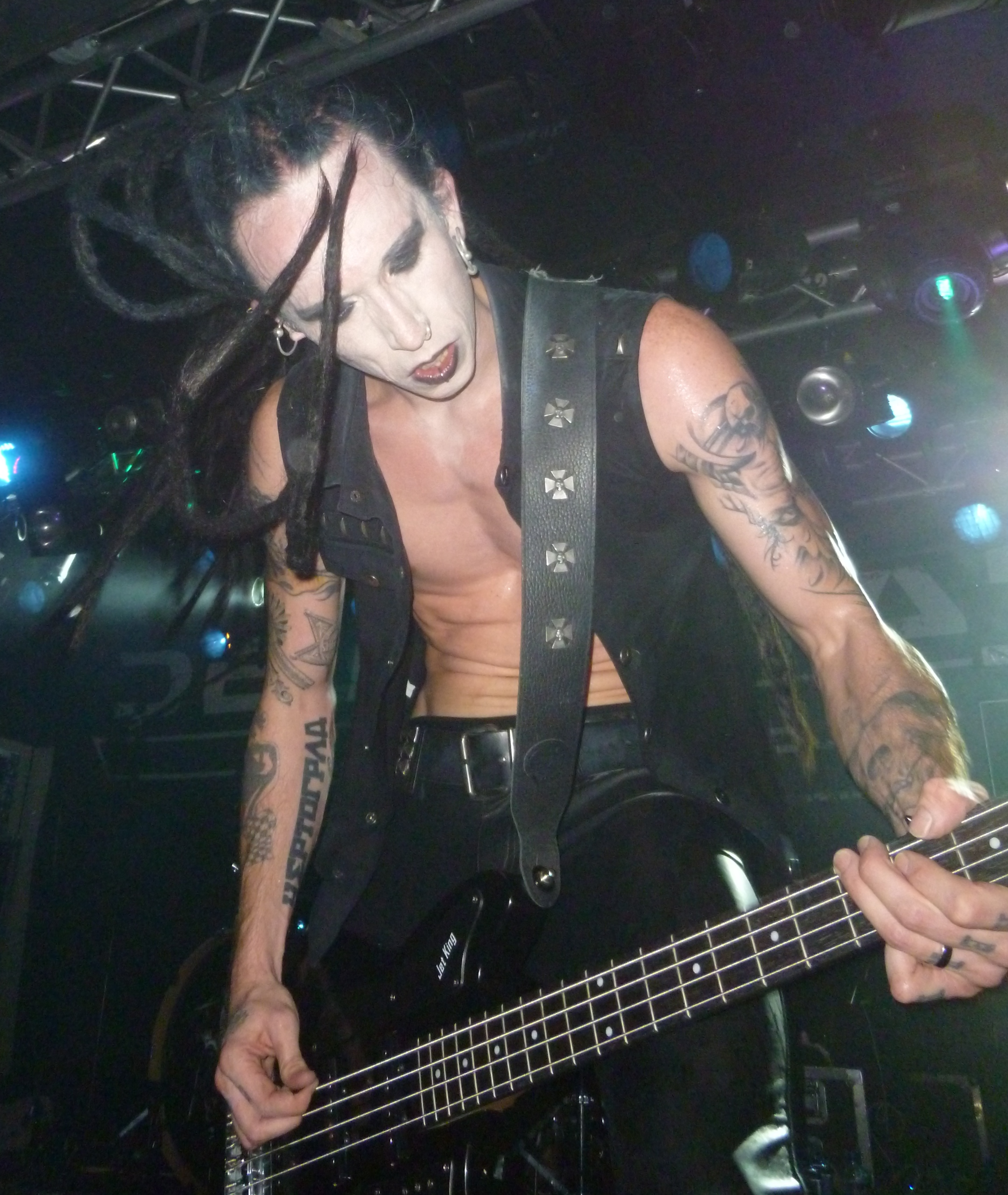 Jonas Kangur alias Skinny Disco Debaser Strand Stockholm 4 October 2014 - 1